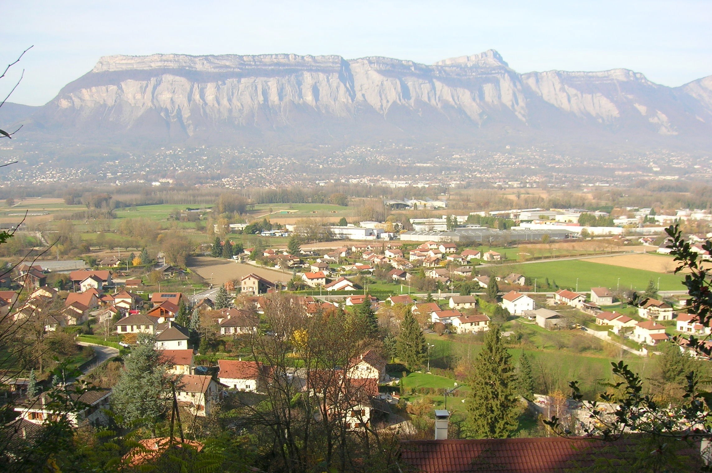 Murianette prise du chemin de la tour